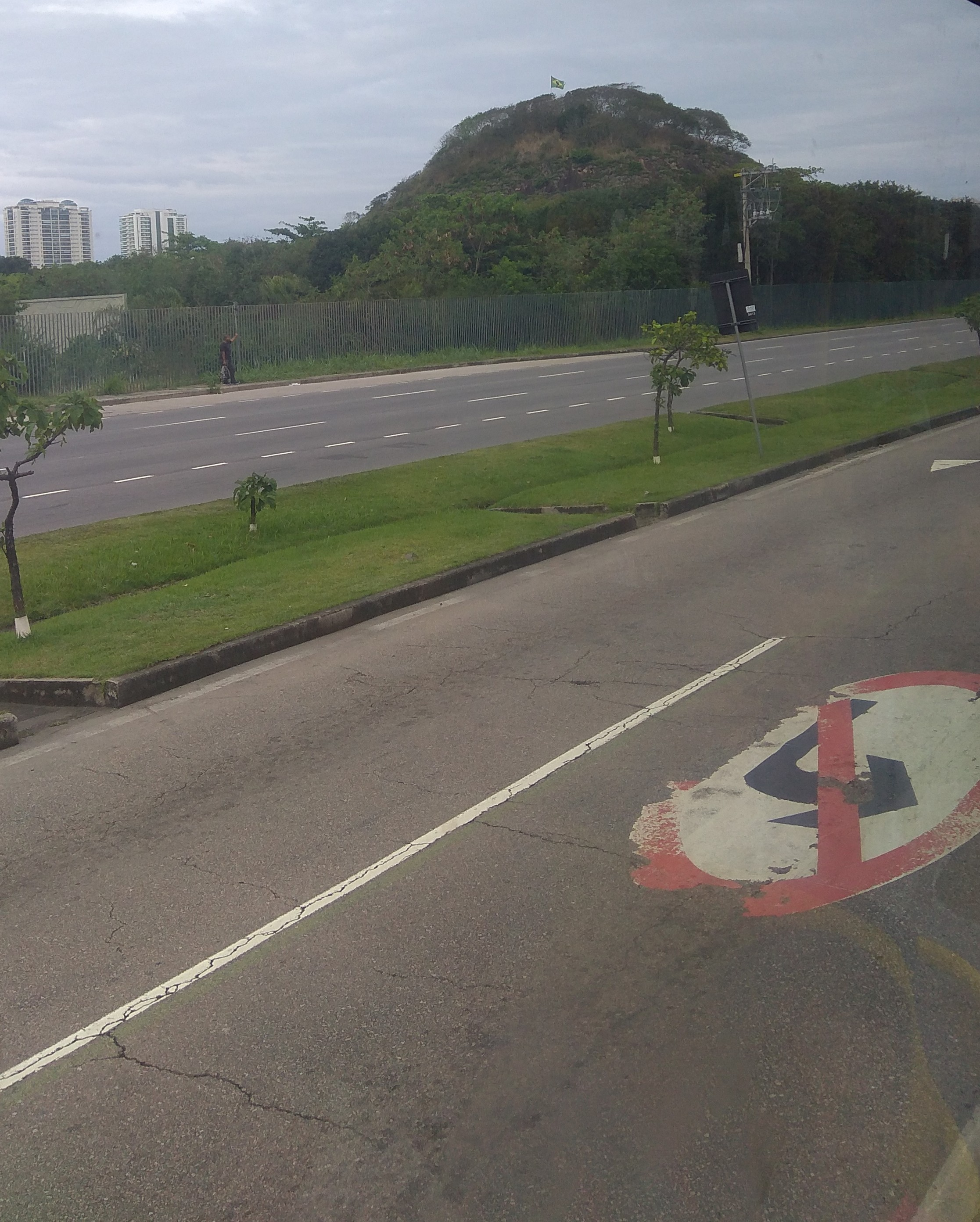 Pedra de Itaúna vista do BRT.